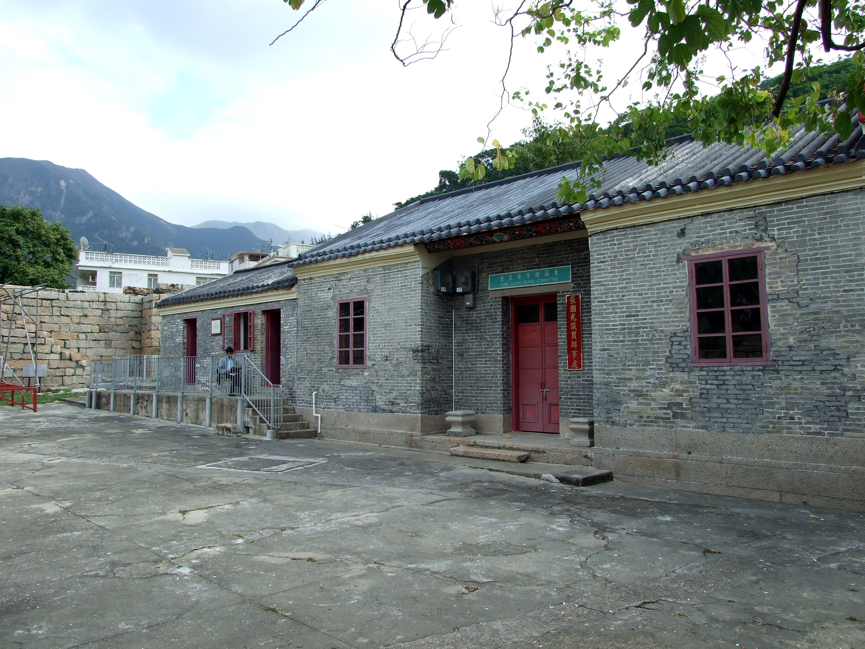 中文（香港）: 東涌炮台內東涌鄉事委員會辦事處和展示廳